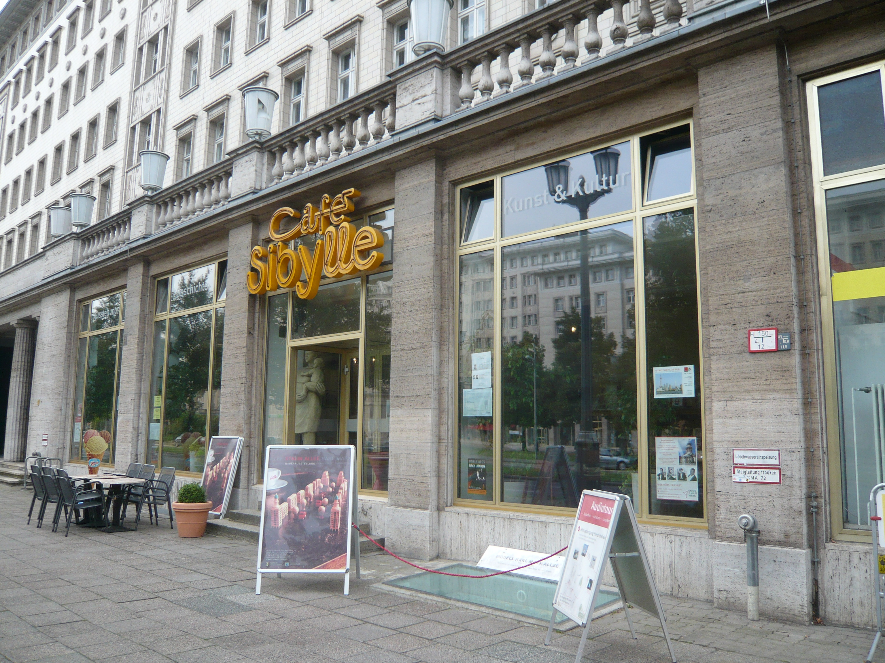 "Café Sibylle" in der Berliner Karl-Marx-Alee